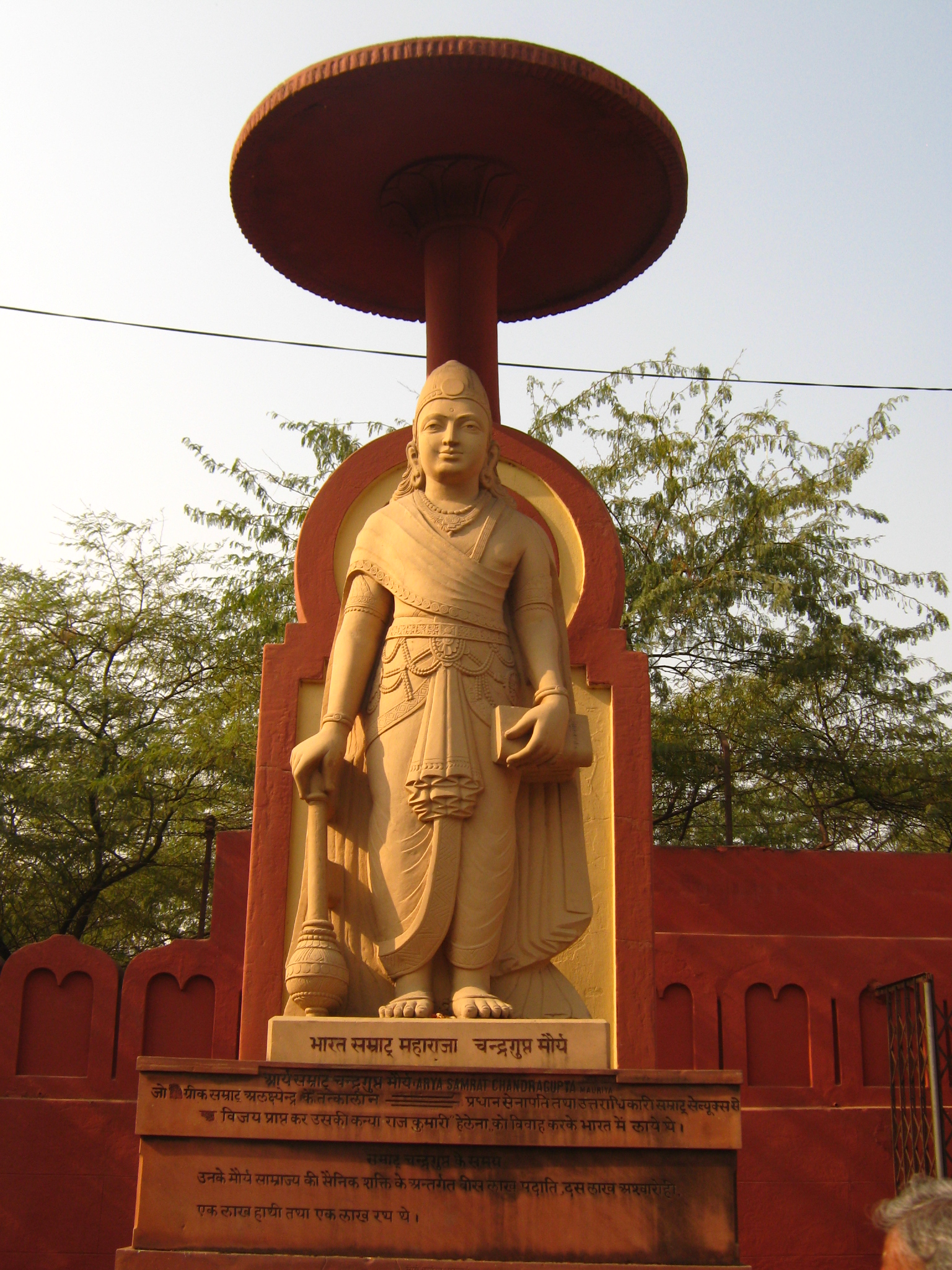 बिरला मंदिर, दिल्ली में एक शैल-चित्र